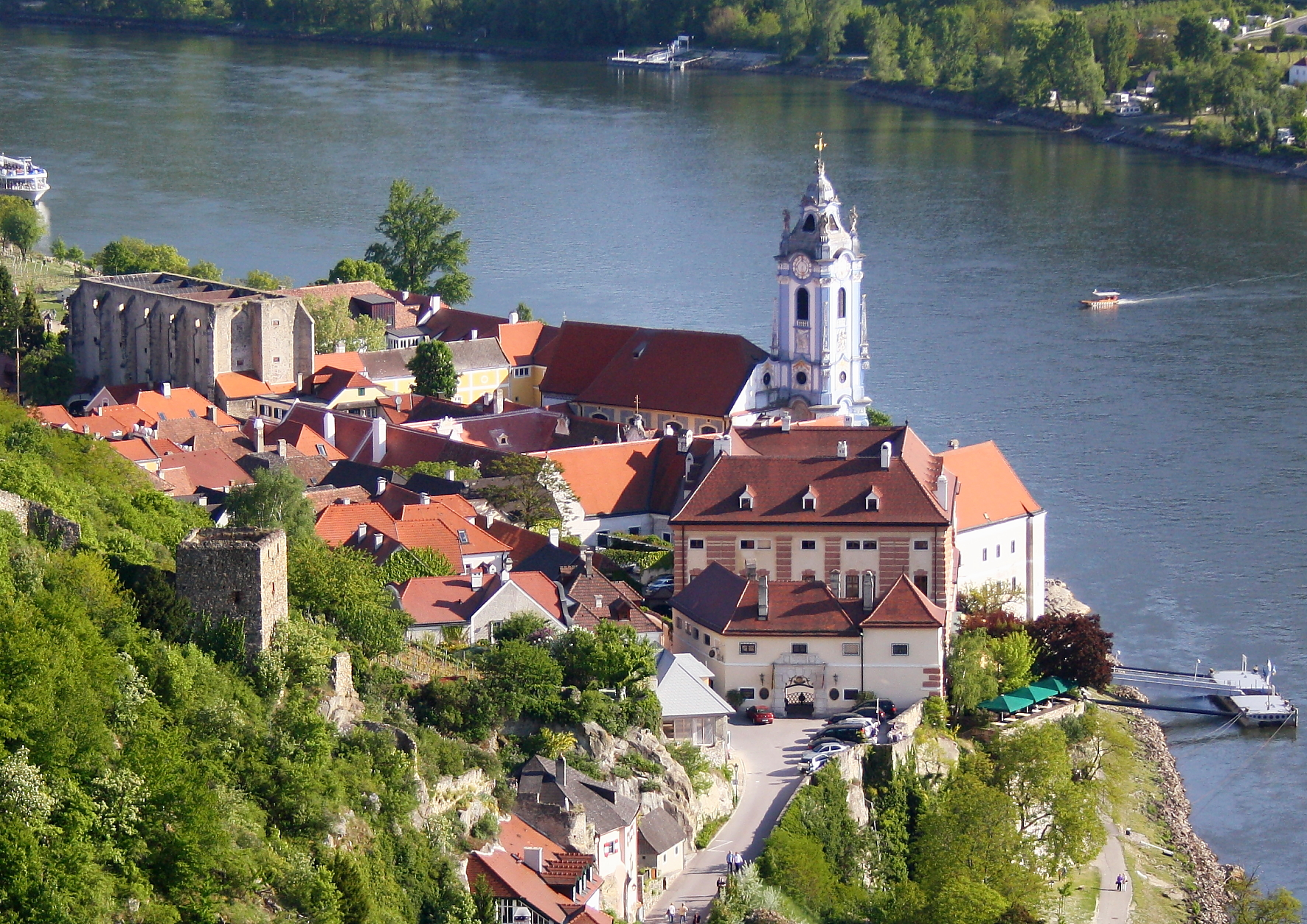 Blick auf den Ortskern von Dürnstein vom Vogelbergsteig aus (Nordwestansicht). Rechts vorne das ehemalige Schloss, in der Bildmitte der Augustinerchorherrenstift-Komplex und links hinten der Komplex des ehemaligen Klarissinnenklosters.